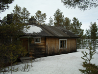 Kuva Ungelon torpasta, vrt Yrjö Kokon Ungelon torppa (1957). Ungelon torppa, Yrjö Kokko